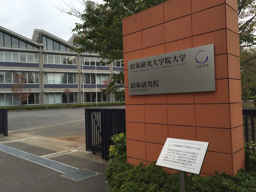 政策研究大学院大学